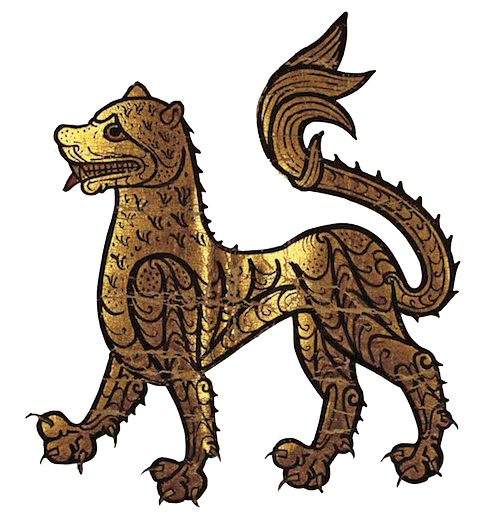 Sinal non-rodado a cor de Afonso VIII, rei de Galiza e León (1188-1230), nun privilexio da catedral de León outorgado en Benavente e confirmatorio doutro do seu avó Afonso VII.